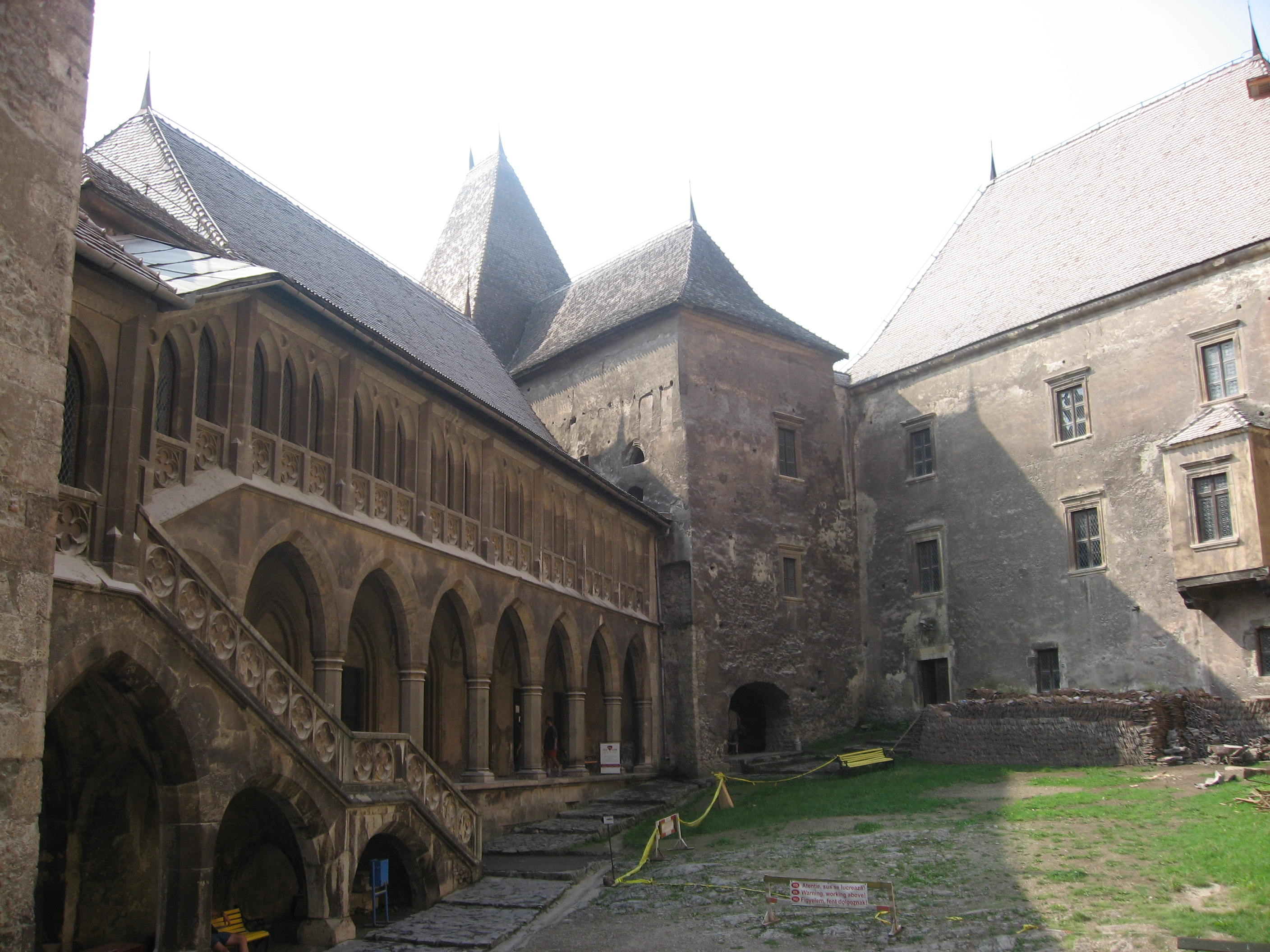 Hrad Hunedoara